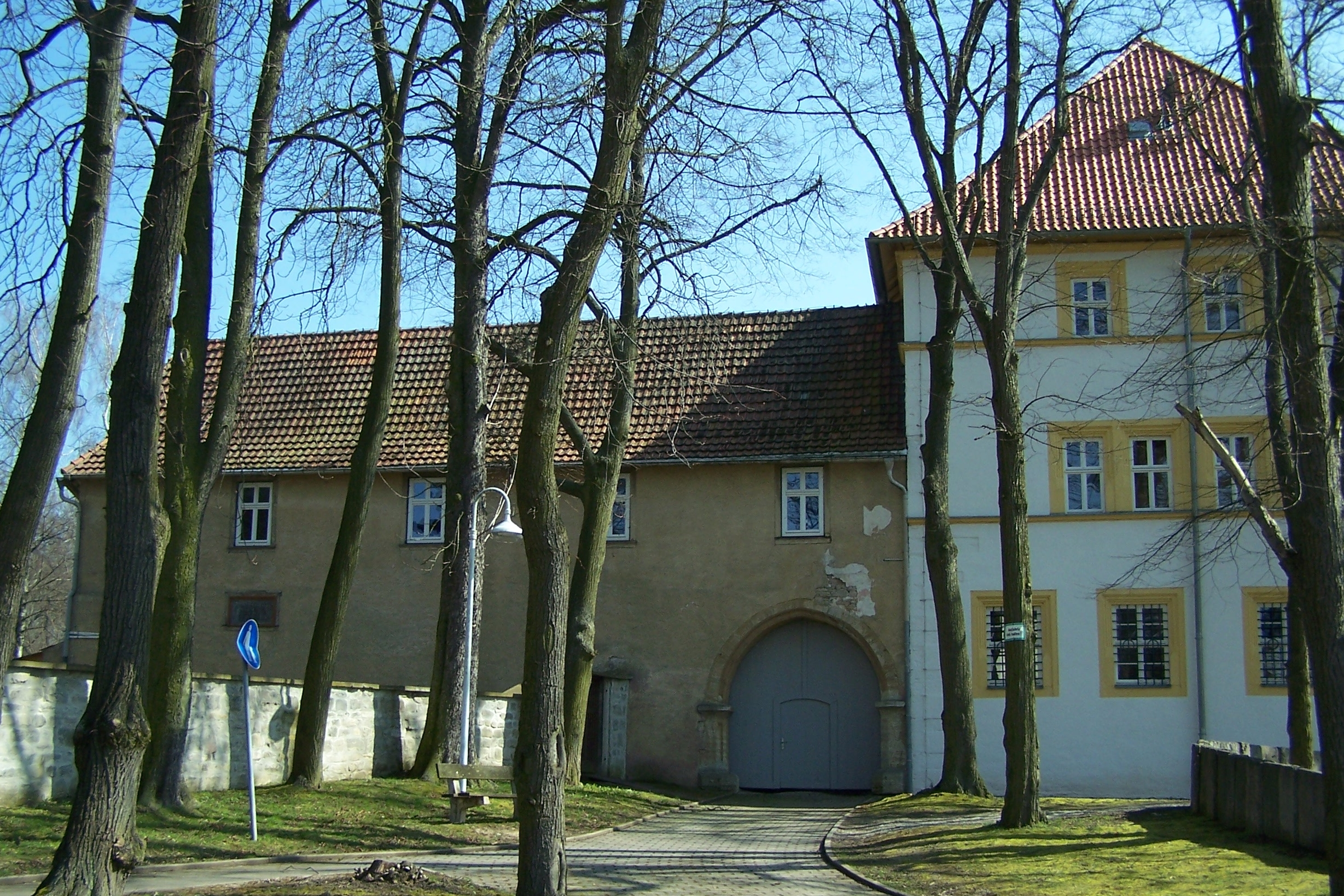 Ansichten und Details zum Ort Behringen im Wartburgkreis.